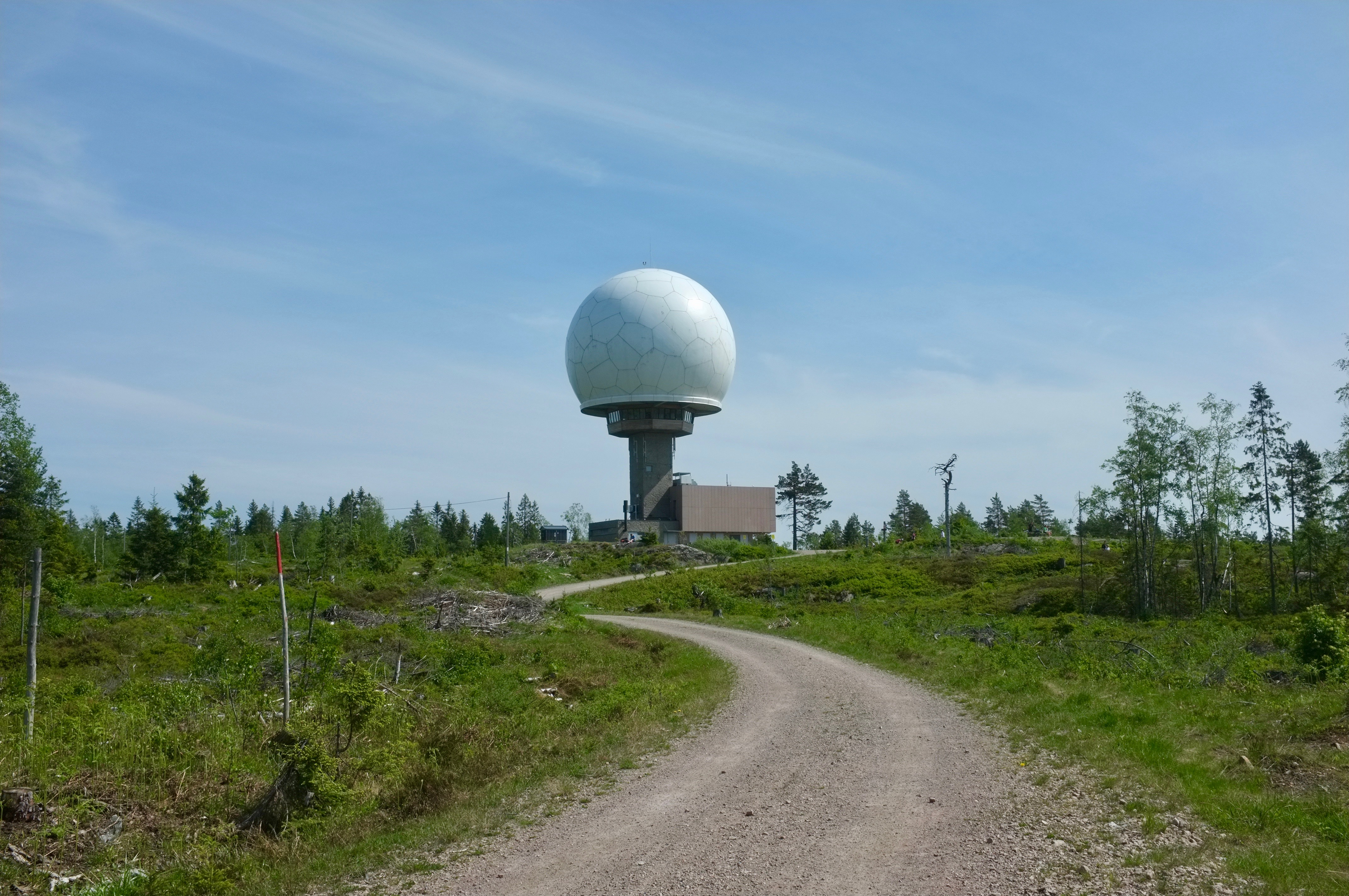 Radaren på Haukåsen i Østmarka i Oslo.